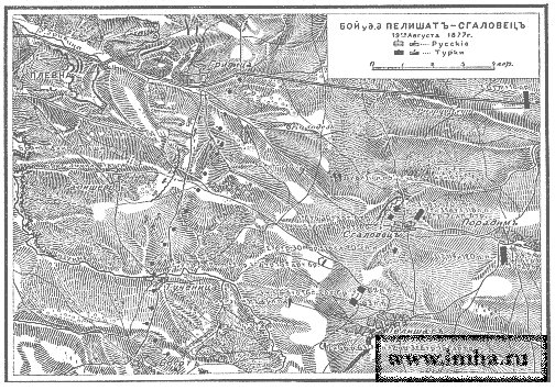 битка при селата Пелишат - Згалево на 31 август 1877 г.